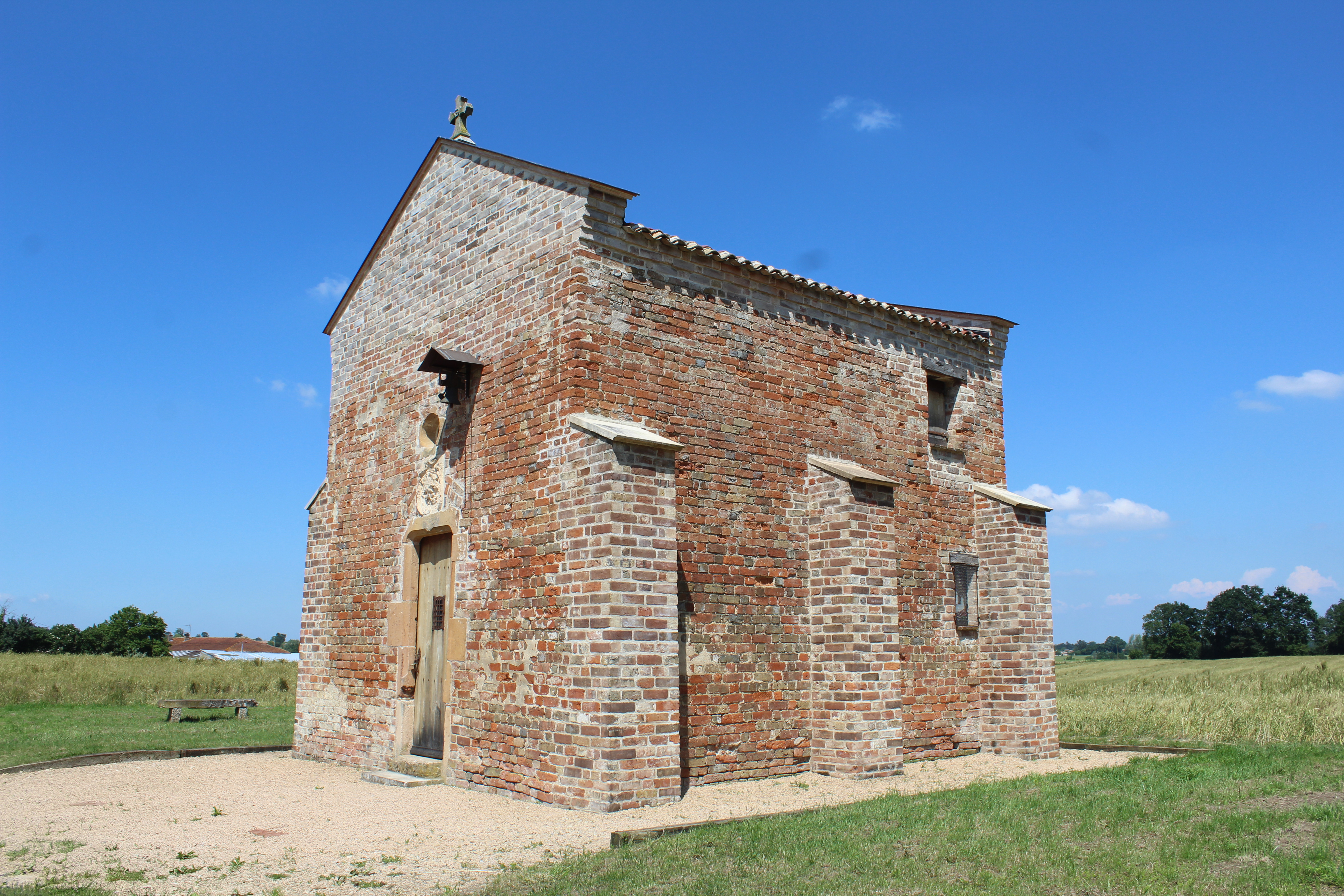 Chapelle d'Aigrefeuille aux Pottets dans la commune de Bâgé-le-Ville.